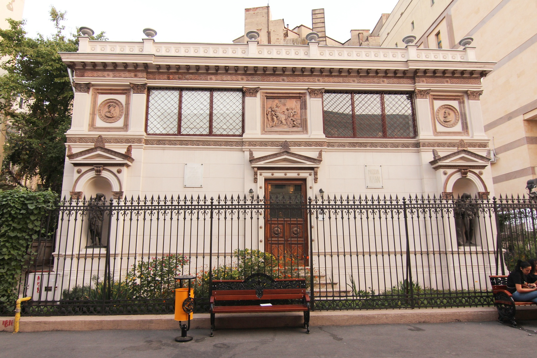 Muzeul Theodor Aman